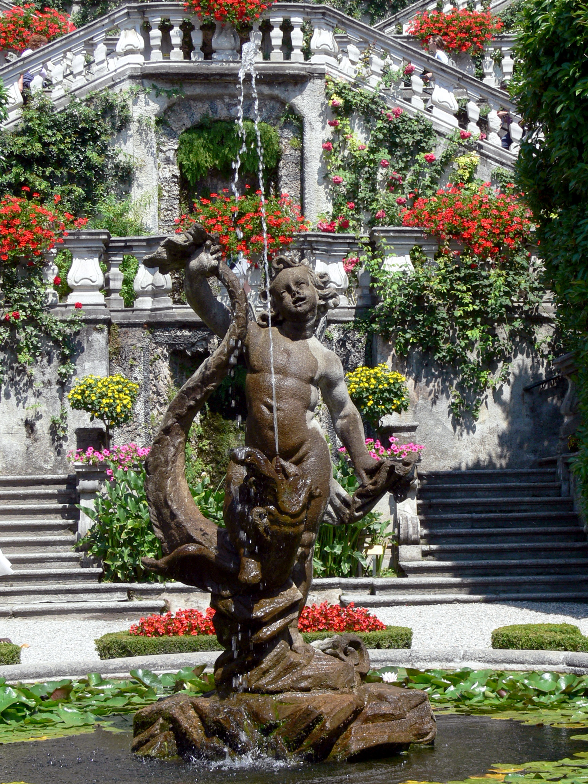 Villa Carlotta in Tremezzo ( Lago di Como ). Springbrunnen vor der Fassade